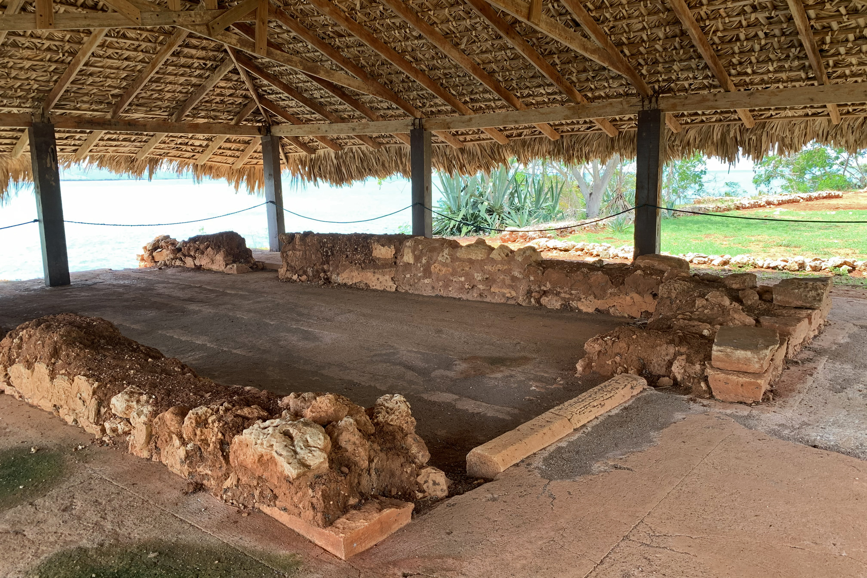 Restos de la fundación de la Casa de Colón en el Parque Nacional Histórico y Arqueológico de La Isabela